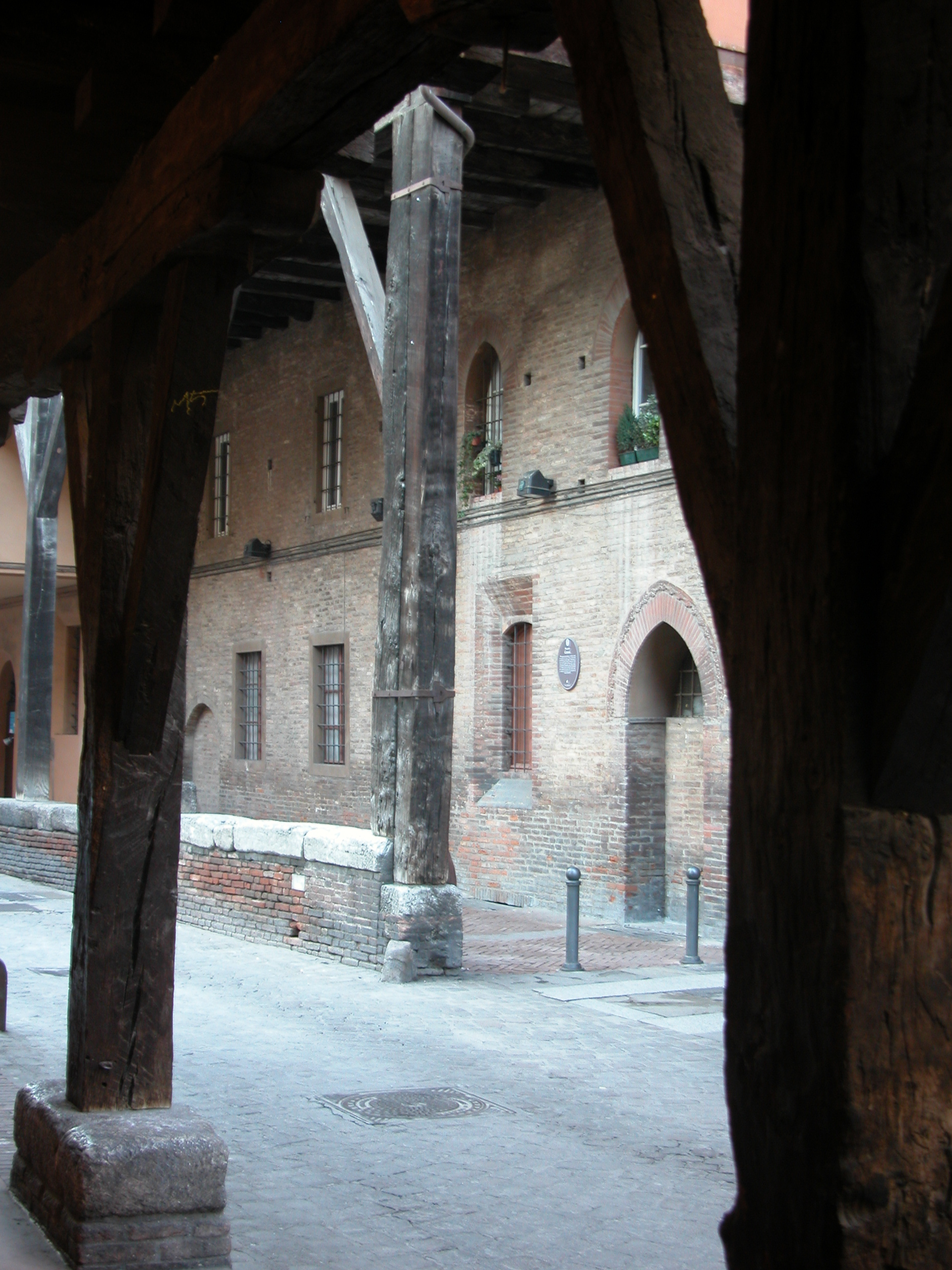 Palazzo Grassi in Via Marsala: Medio Evo a Bologna